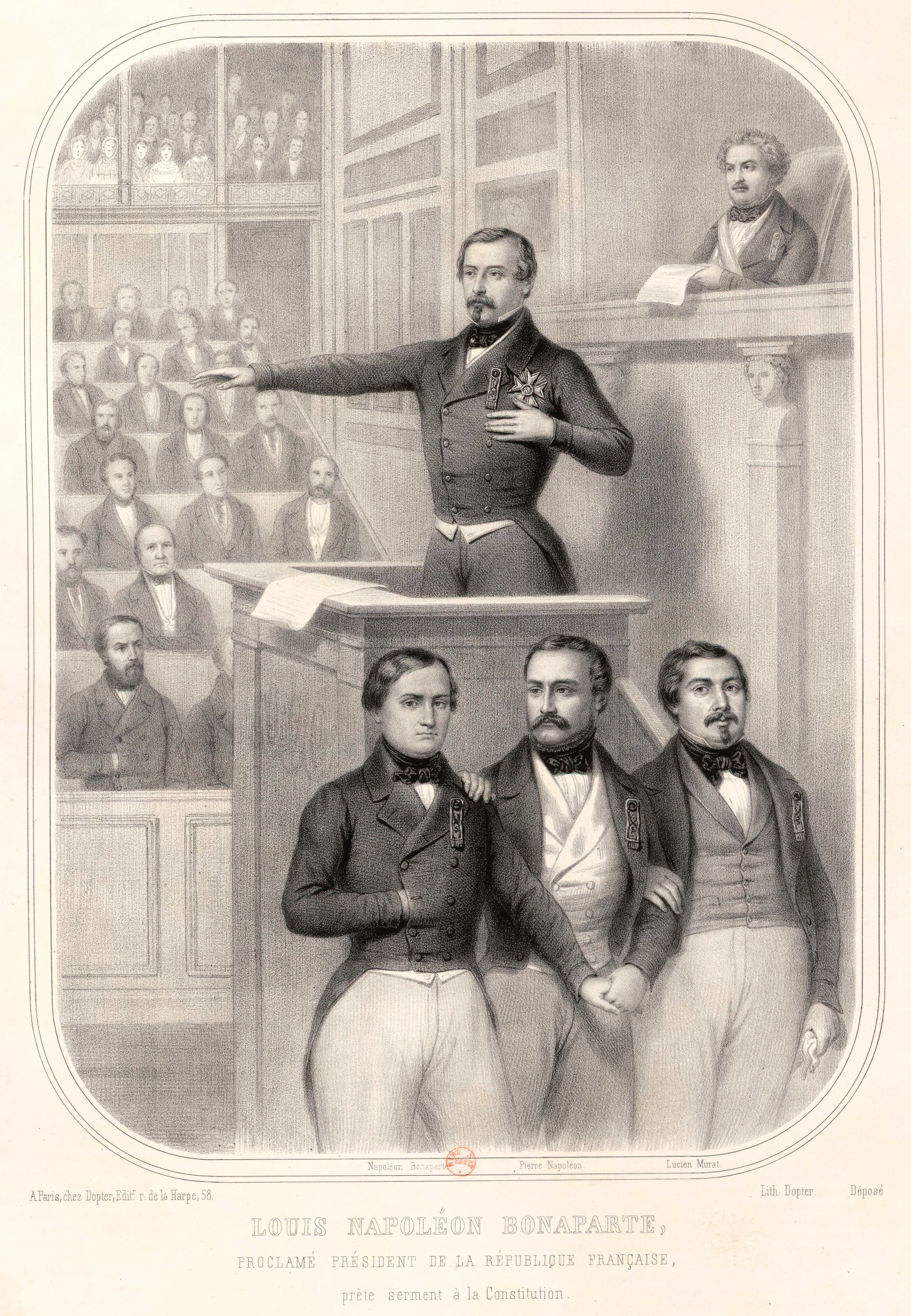 Louis Napoléon Bonaparte, proclamé Président de la République française, prête serment à la Constitution.